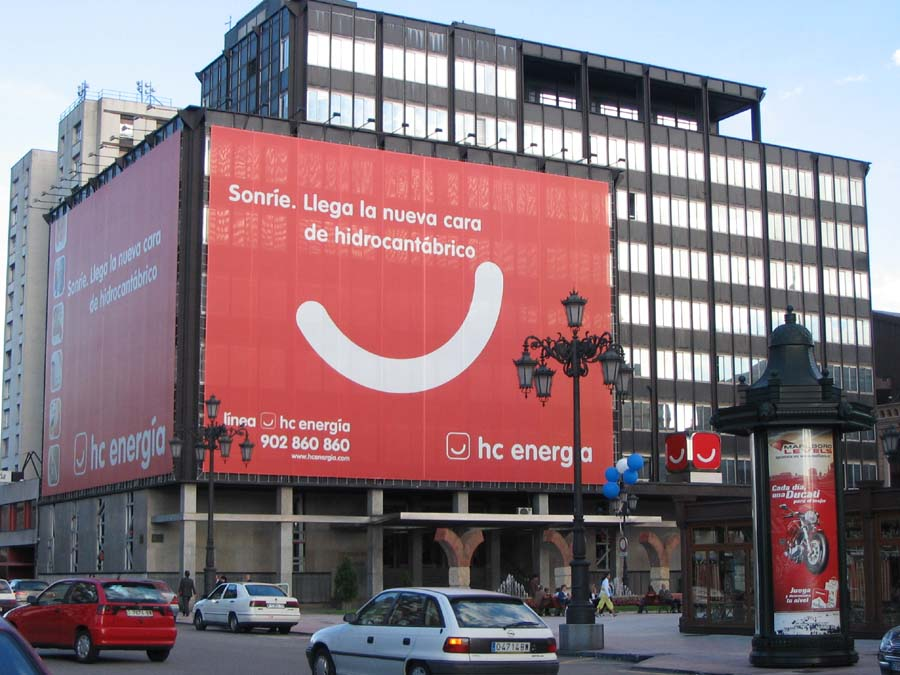 Descripción: Sede central de HC Energía en Oviedo, Asturias. Fuente: Foto tomada por Rodrigouf el 21 de octubre de 2005.